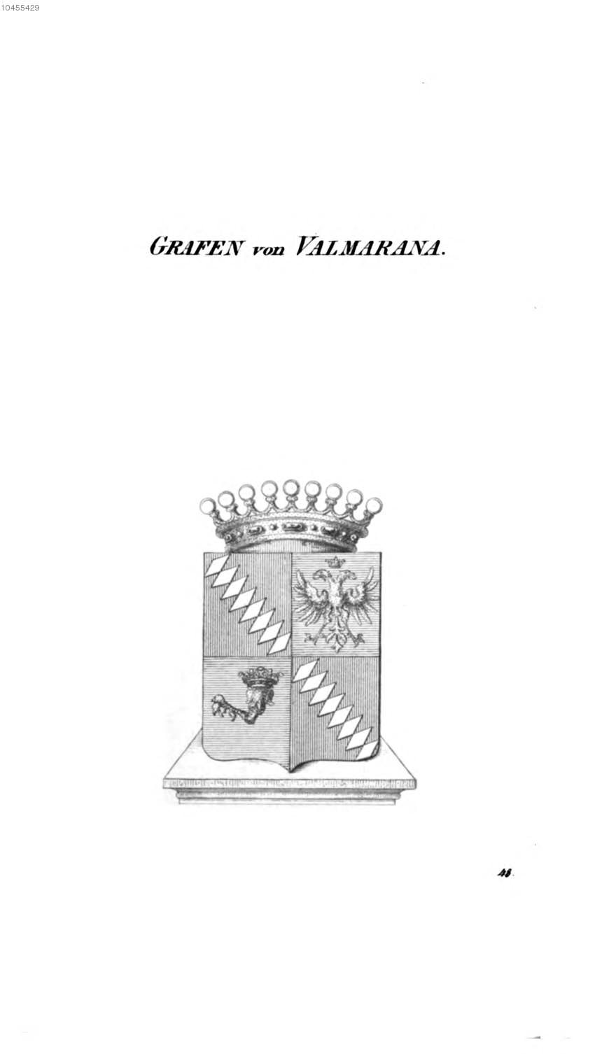 Wappen Valmarana 5 - Tyroff AT.jpg